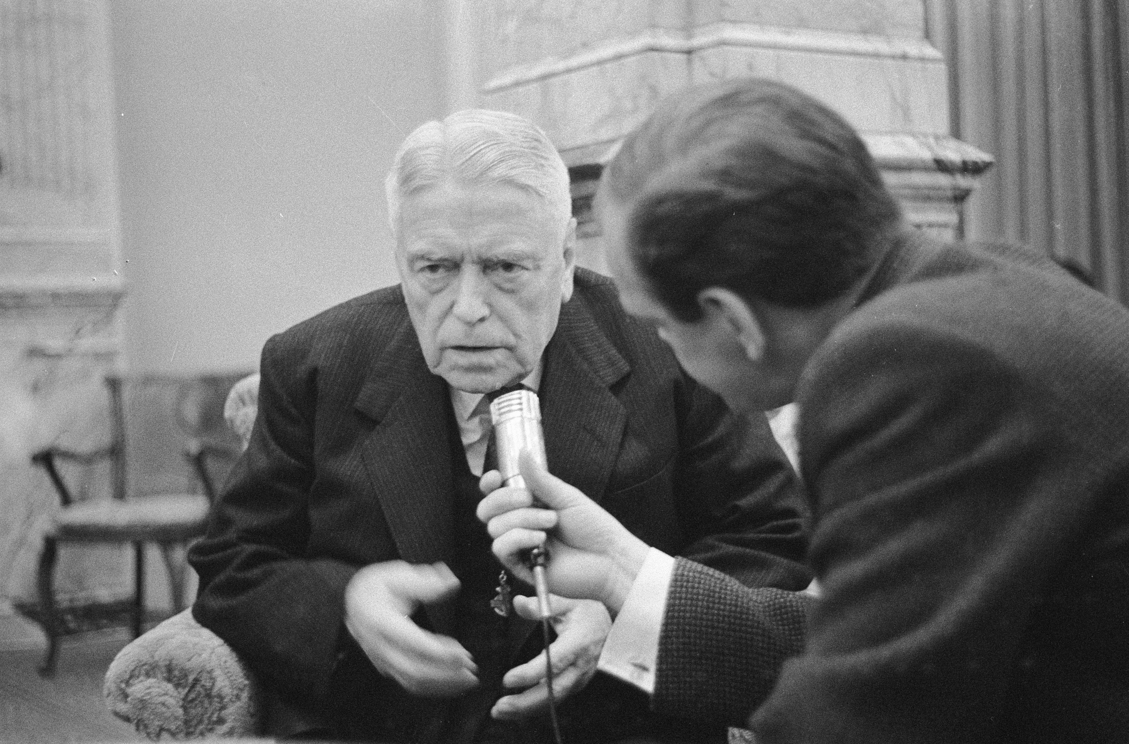 Collectie / Archief : Fotocollectie Anefo Reportage / Serie : [ onbekend ] Beschrijving : Aankomst premier van Nieuw Zeeland Walter Nash in Den Haag , na aankomst sprak Premier Nash enige woorden voor de radio Datum : 19 mei 1960 Locatie : Den Haag, Zuid-Holland Trefwoorden : aankomsten, premiers Persoonsnaam : Nash, Walter Fotograaf : Pot, Harry / Anefo Auteursrechthebbende : Nationaal Archief Materiaalsoort : Negatief (zwart/wit) Nummer archiefinventaris : bekijk toegang 2.24.01.05 Bestanddeelnummer : 911-2679